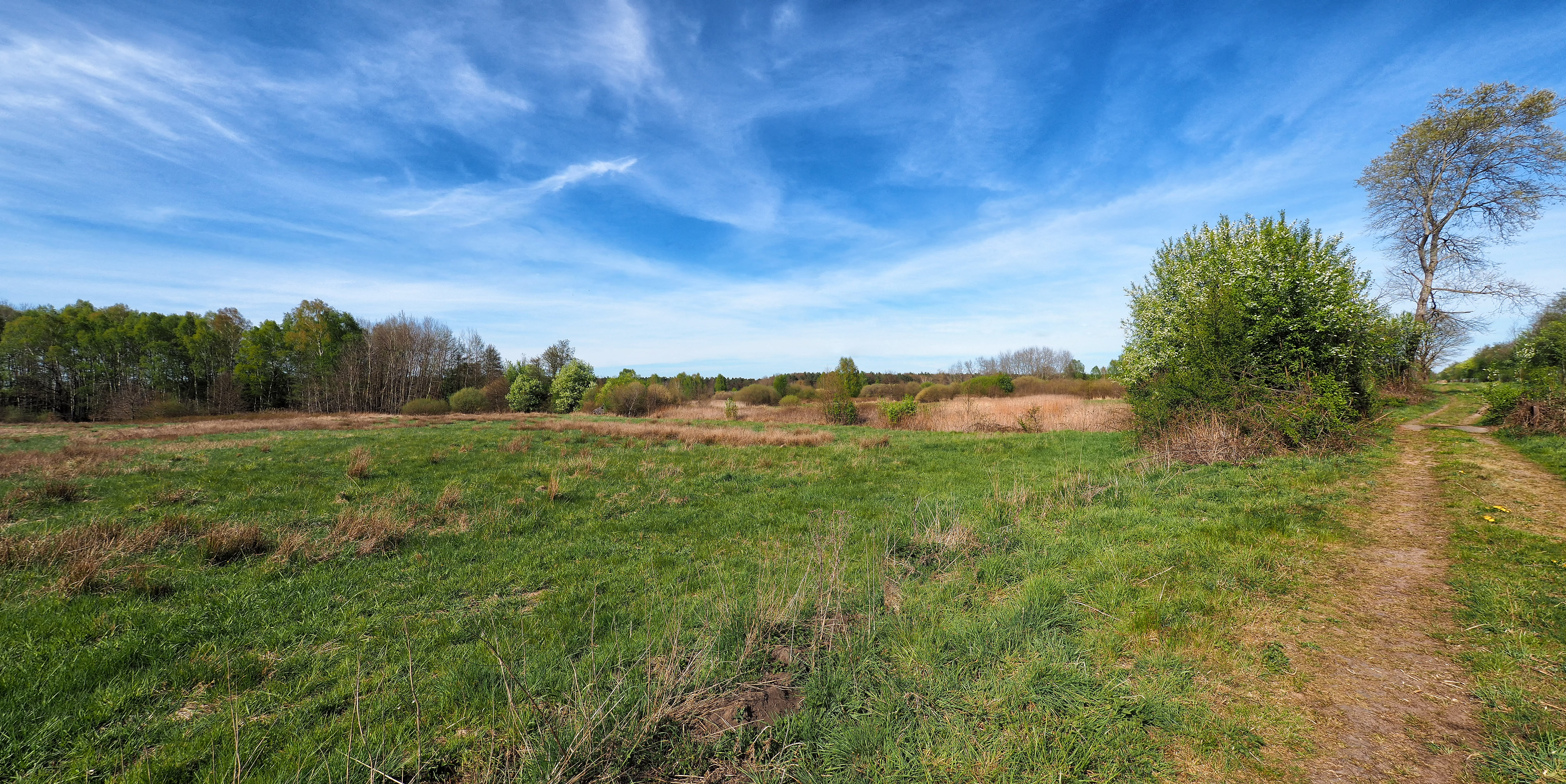 Naturschutzgebiet Schlangenbruch, Blick nach Nordosten